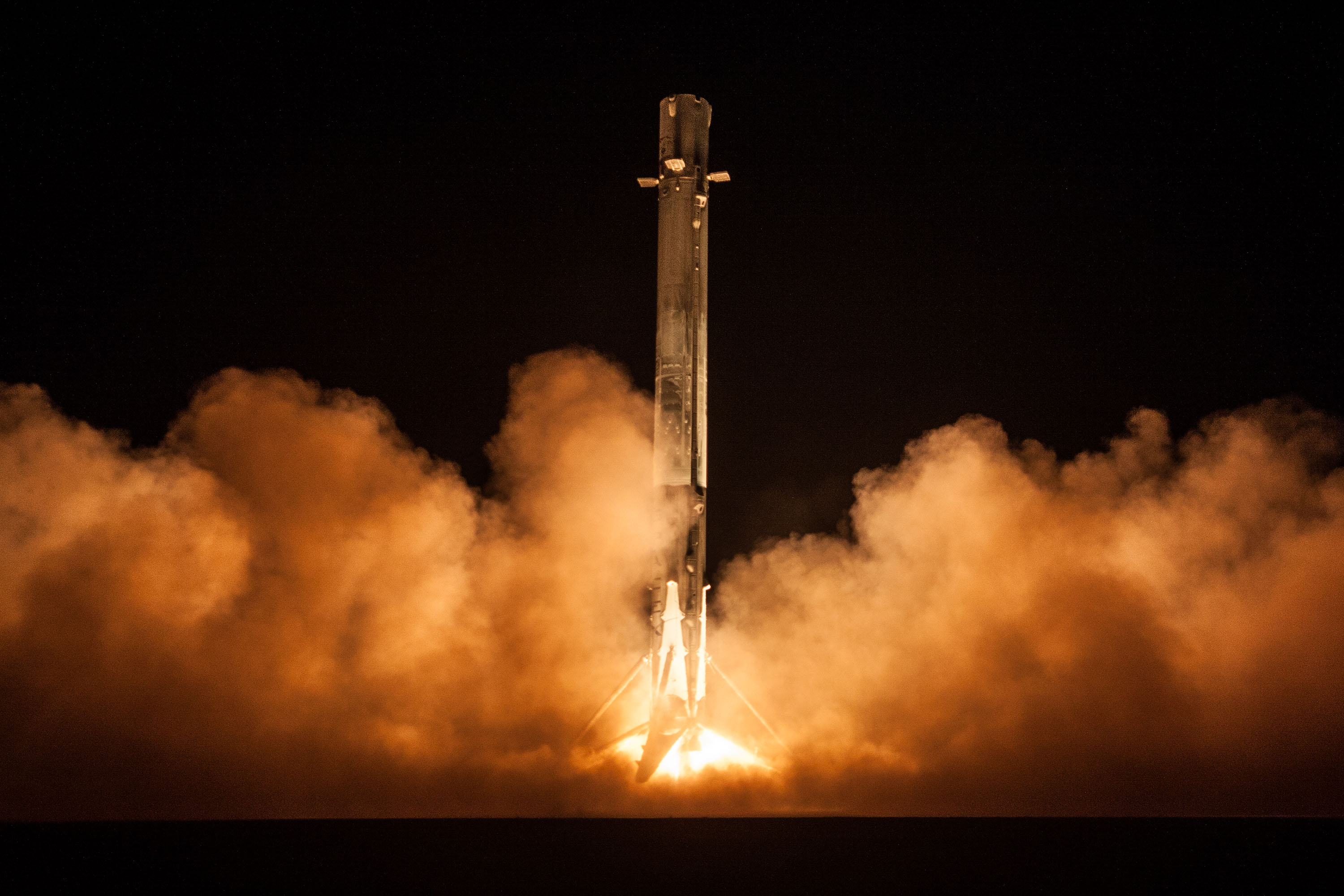 Falcon 9 Landing at LZ-1 after delivering ZUMA to orbit